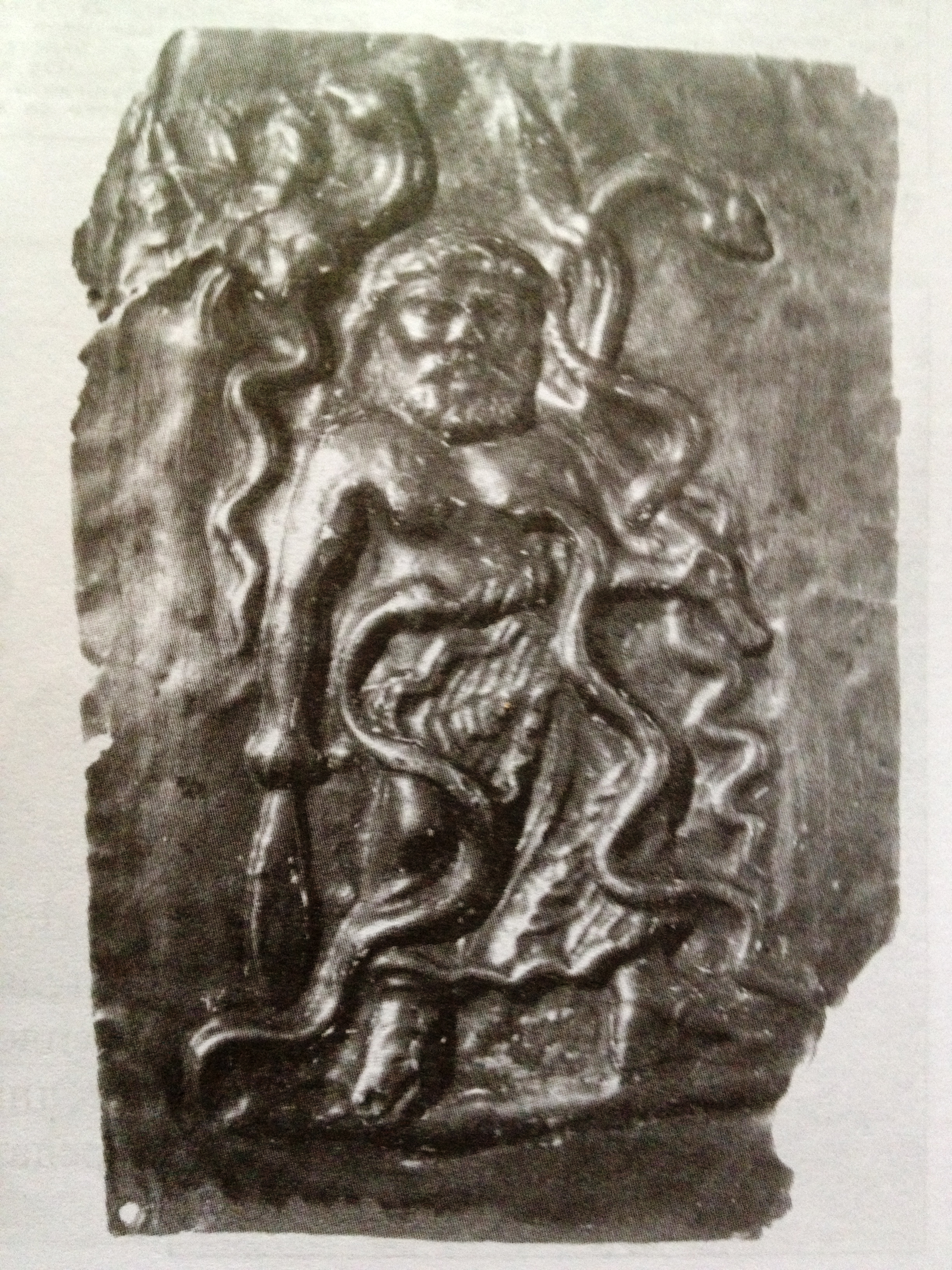 сребърна оброчна плочка с изображение на бог Сабазий от Белинташ